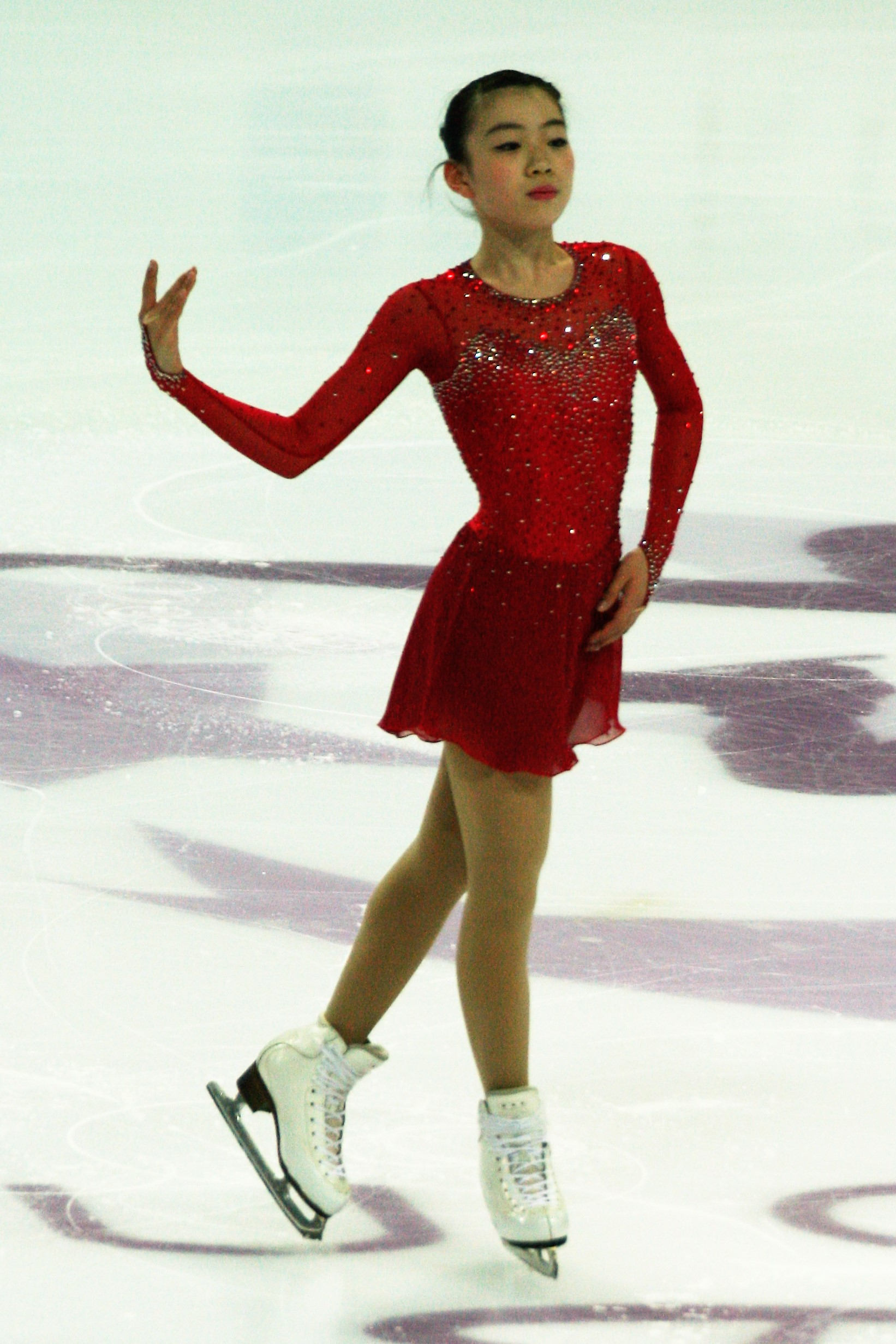 Рика Кихара (Япония) на финале Гран-при по фигурному катанию среди юниоров 2016-2017